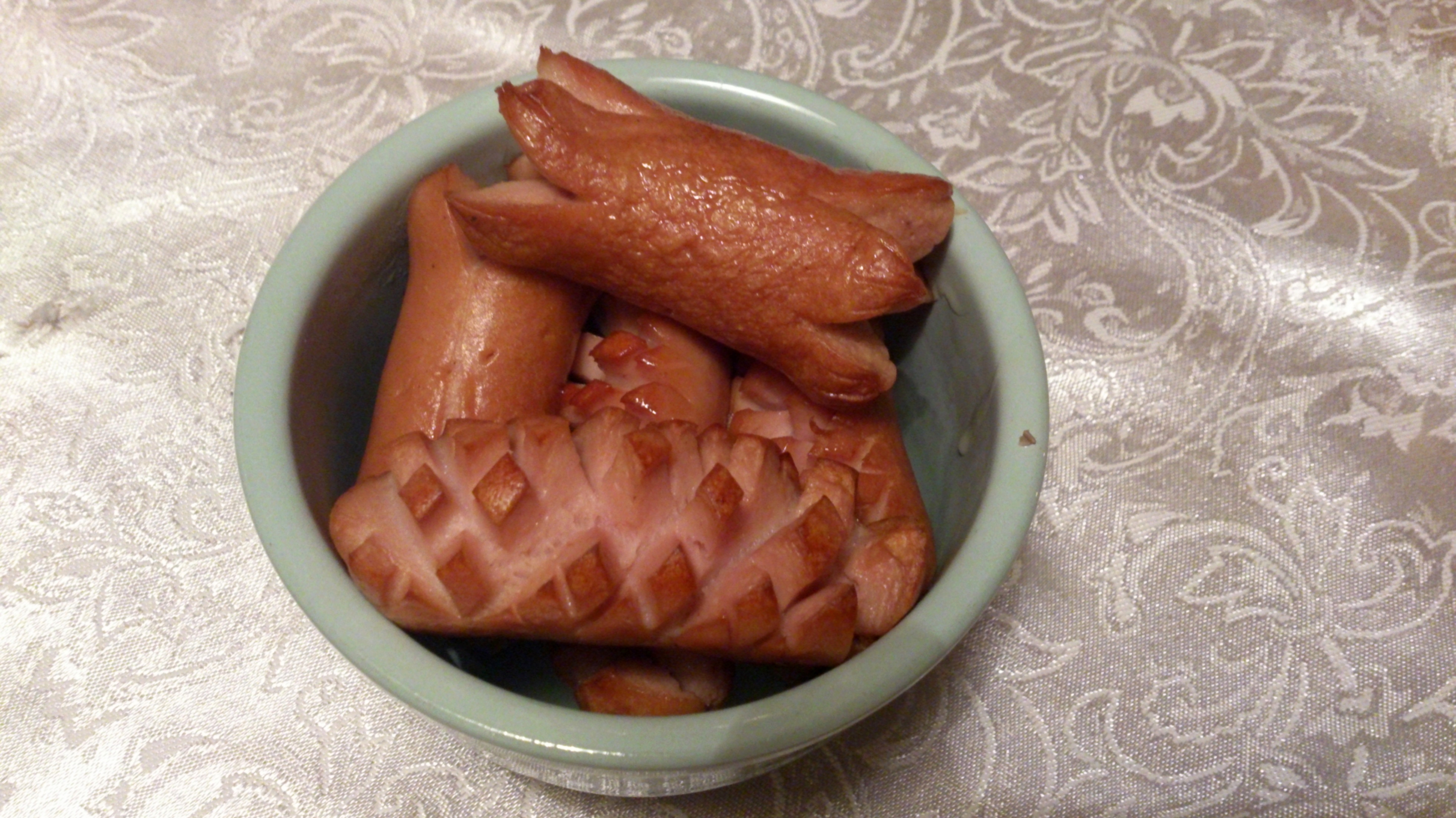 Ahjus küpsetatud viinerid